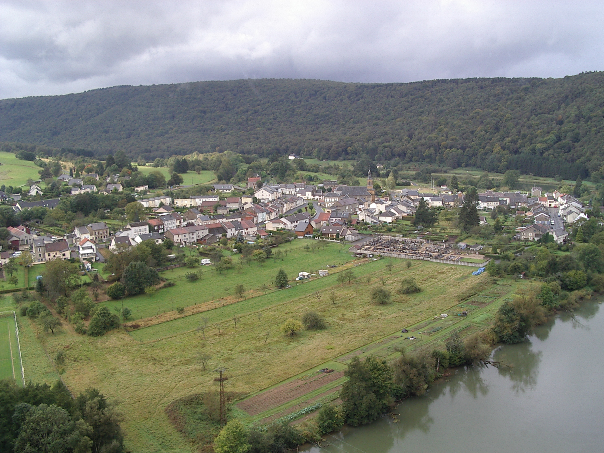 Joigny-sur-Meuse est une commune située dans le departement des Ardennes, France